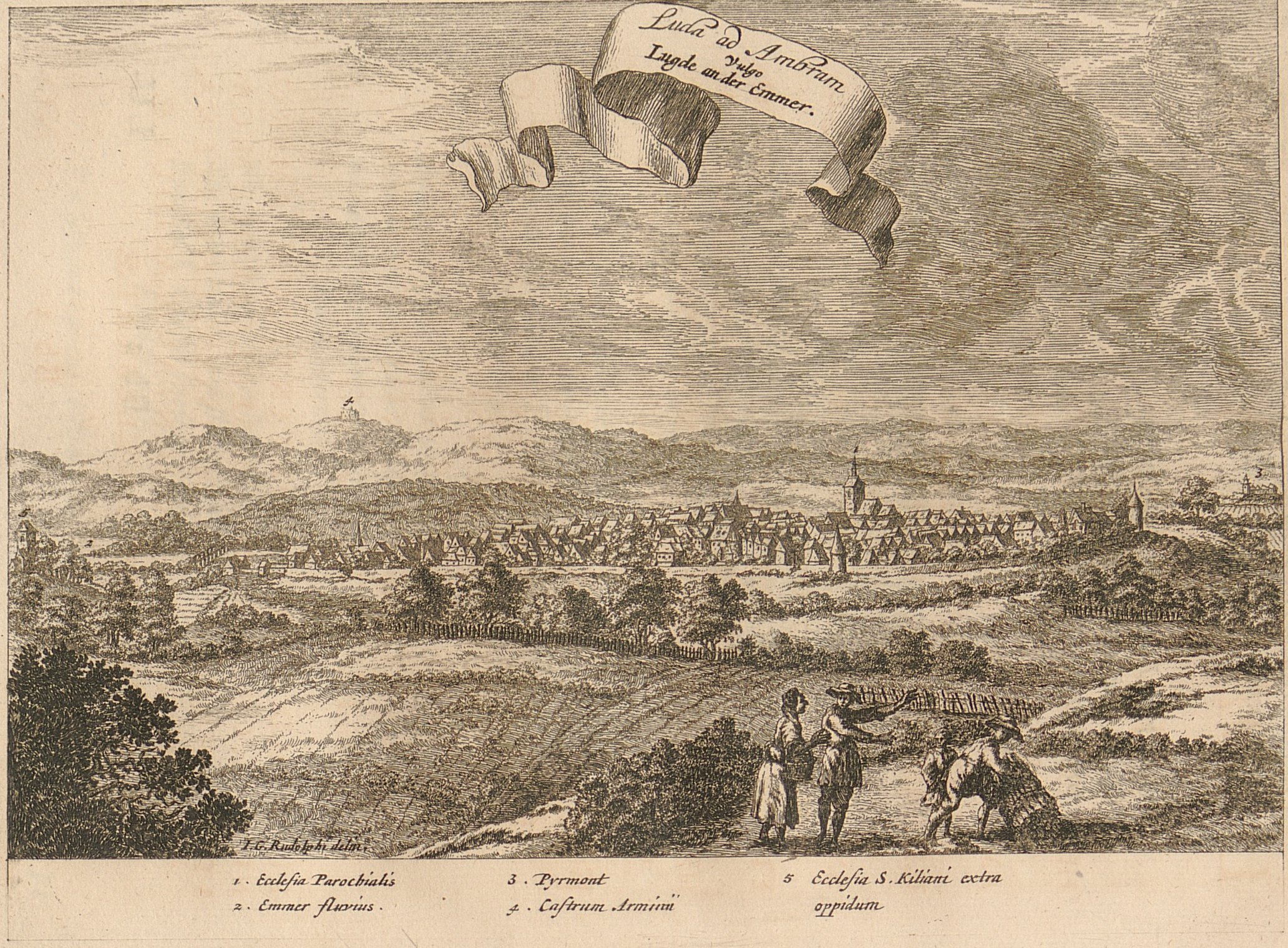 Lügde an der Emmer